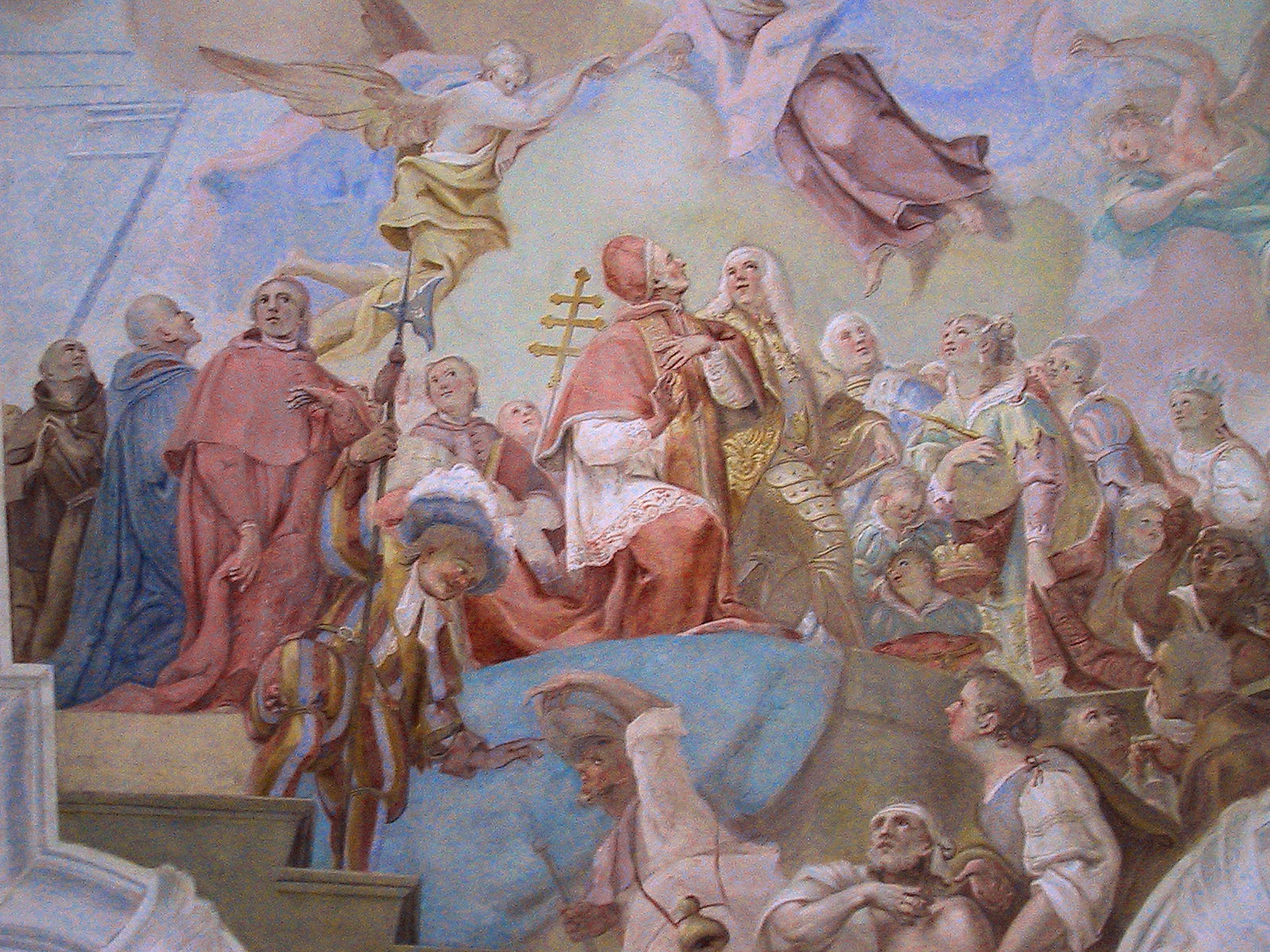 Aufnahme 16. Mai 2005, Schlosskapelle Mammern, Deckengemälde im Langhaus der Schlosskapelle Mammern von Franz Ludwig Hermann (1750). Rechts neben dem Kreuz Karl Borromäus, daneben Leopold III., Markgraf von Österreich, anschliessend Kaiser Franz I und Kaiserin Maria Theresia. Fotograf Peter Berger (selbst fotografiert). Lizenzstatus "GNU-FDL".